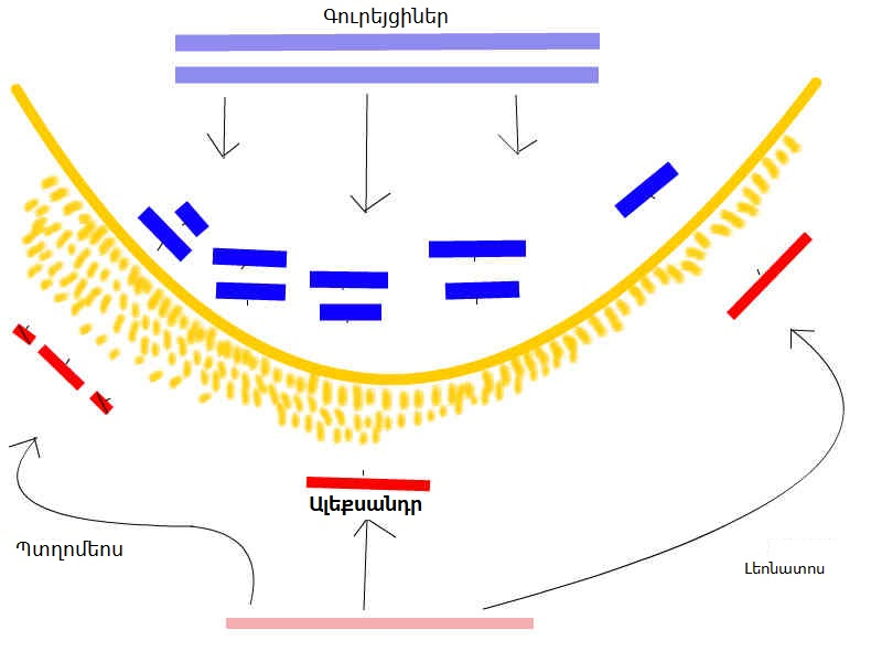 Արիգեյումի ճակատամարտի սխեման